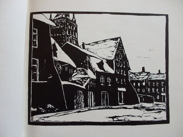 Пауль Бурман. Улица Таллина, 1910.